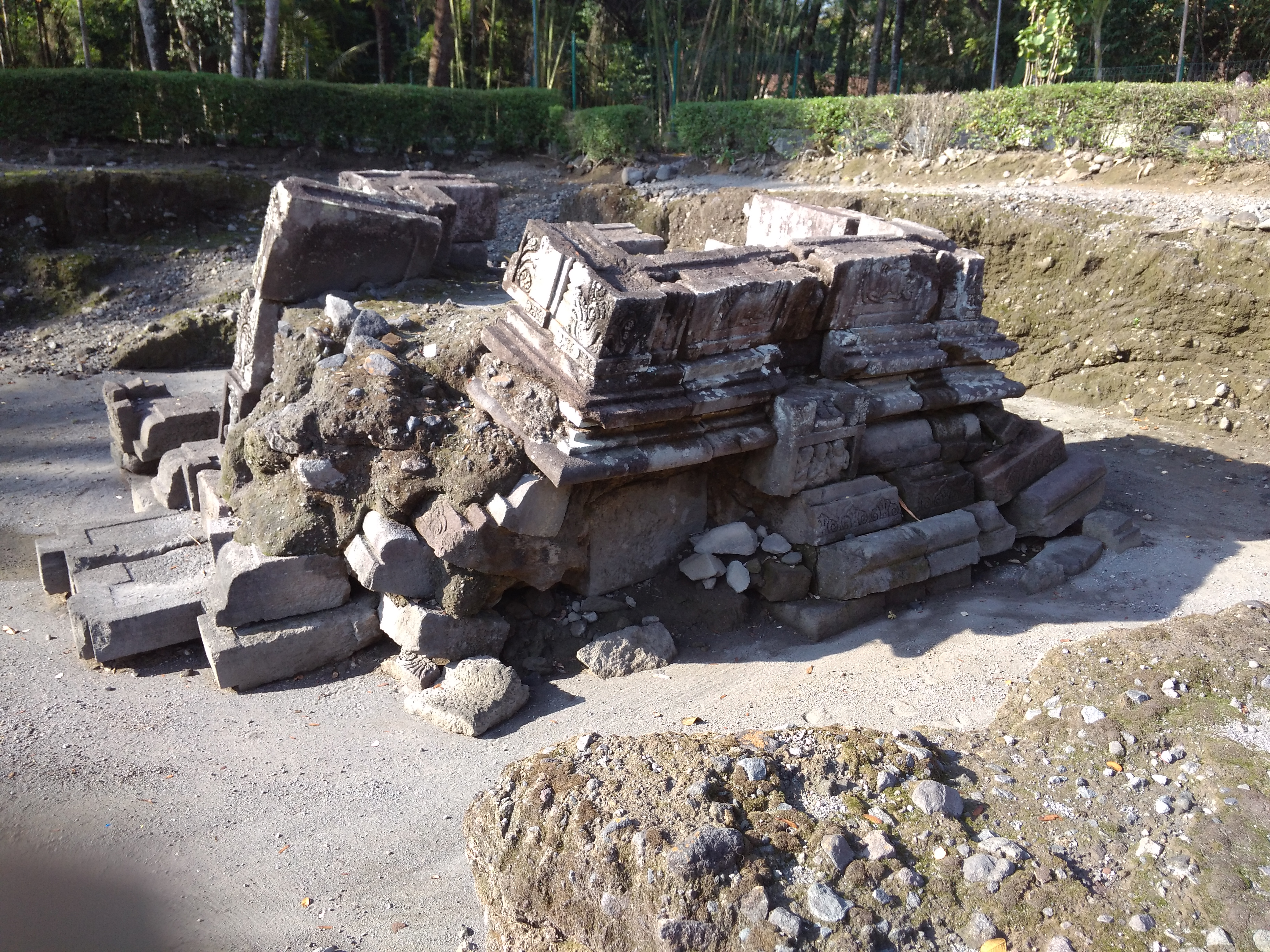 Candi Morangan di Yogyakarta